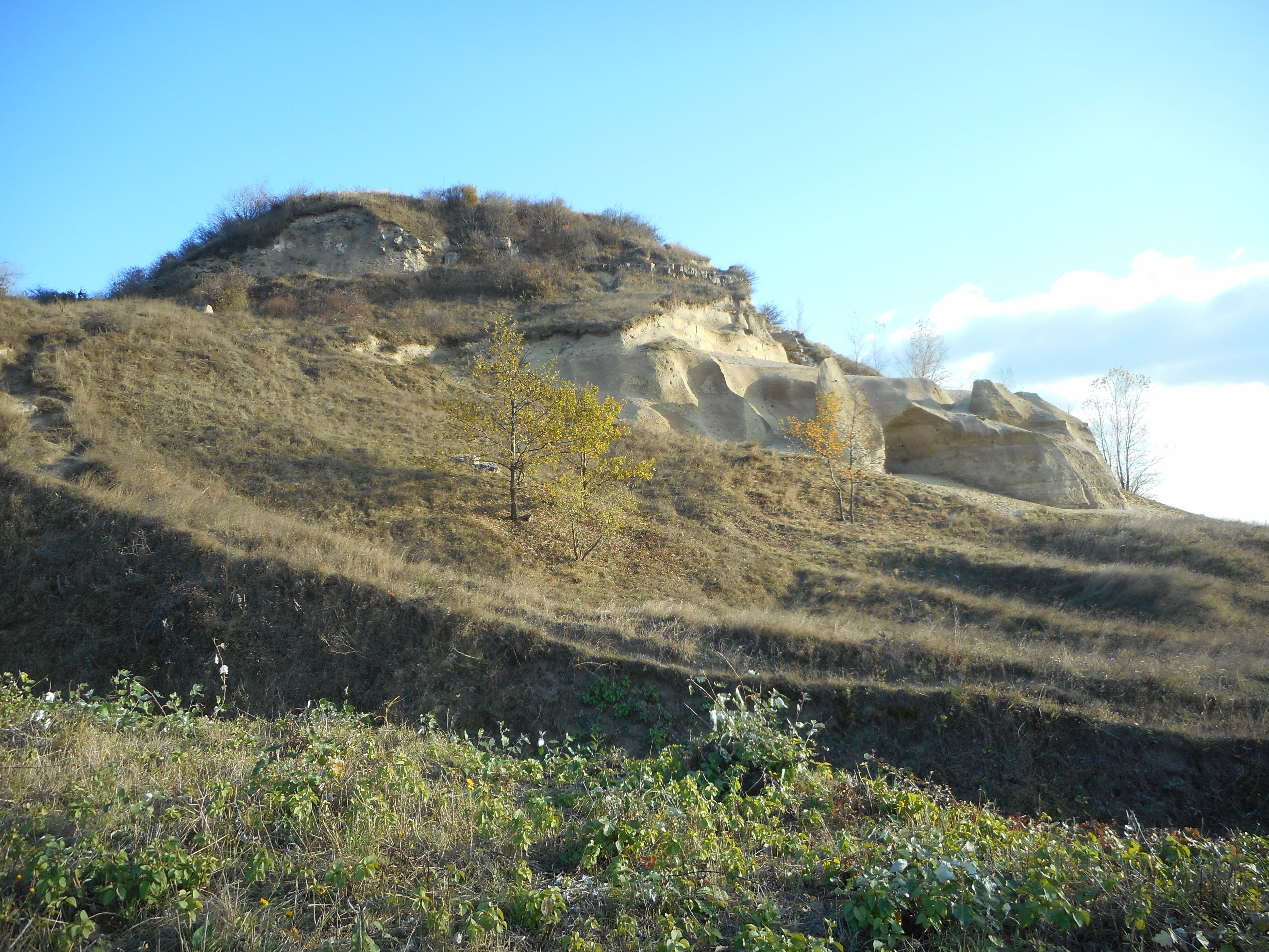 Sandberg